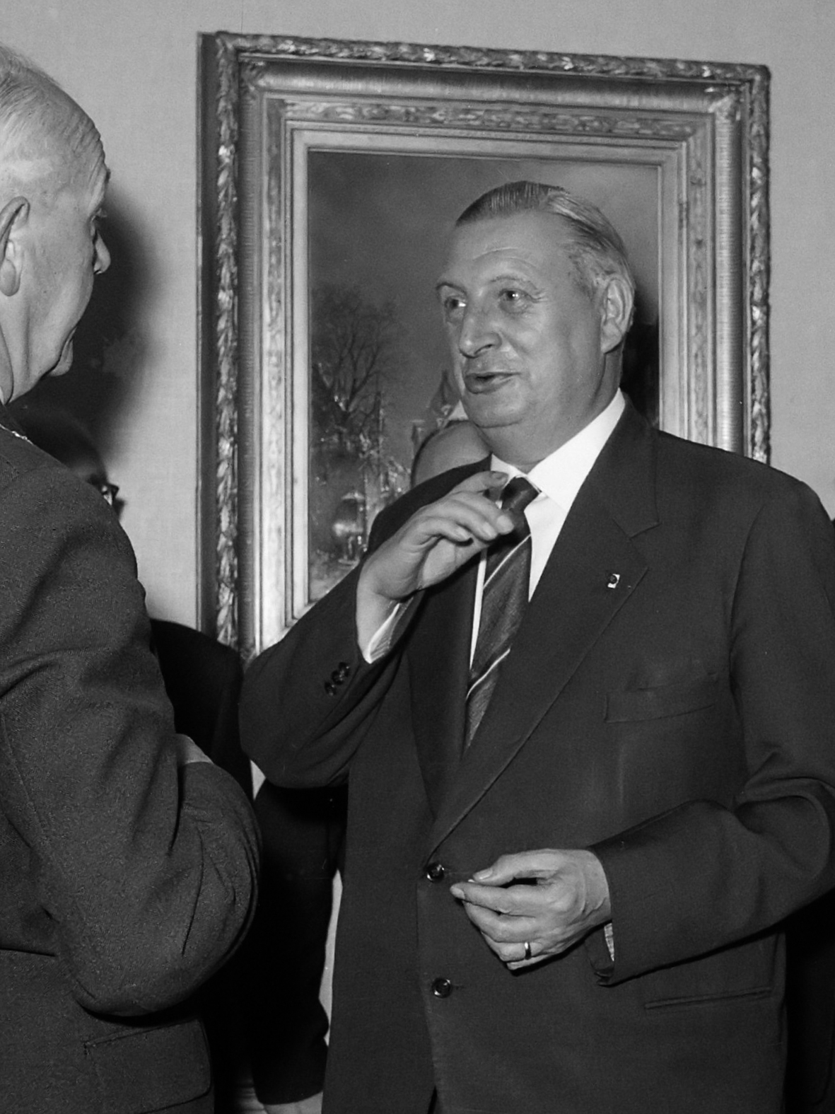 Uitreiking Constantijn Huygensprijs voor Anton van Duinkerken (pseudoniem van W.J.M.A. Asselbergs) , burgemeester Van Kolfschoten in gesprek met A. van Duinkerken 26 november 1960